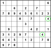 Stap 1.